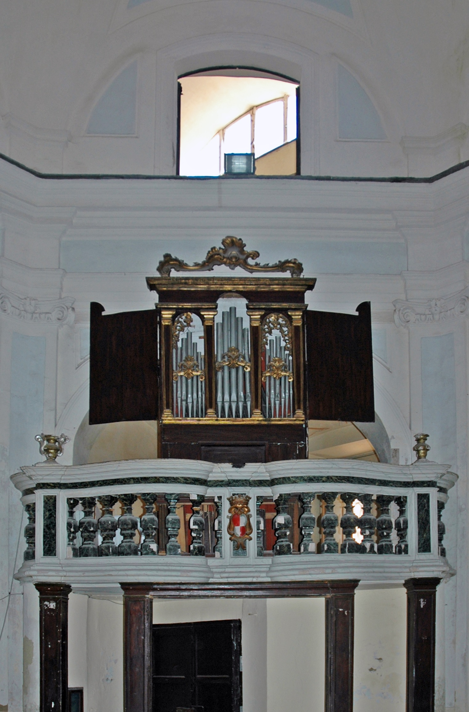 Organo costruito da Tomaso de Martino nel primo quarto del XVIII secolo (I+P/9)